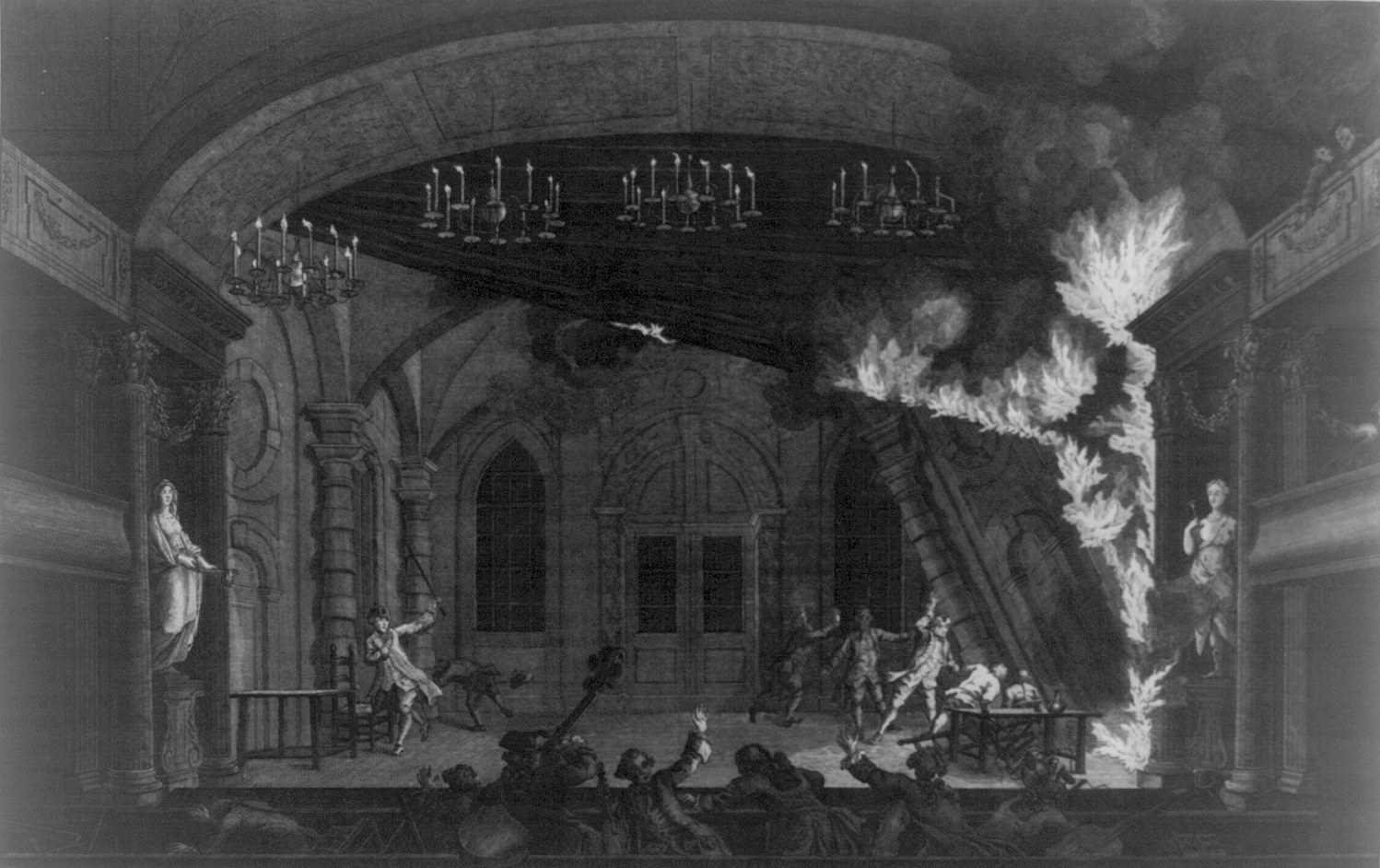 Afbeelding van den Brand op't Tooneel in den Schouwburg te Amsterdam; den 11den May, 1772. De vlam barst uit: elk voelt door schrik zich overheeren: Hoe schielijk kan't vermaak in jammerklagt